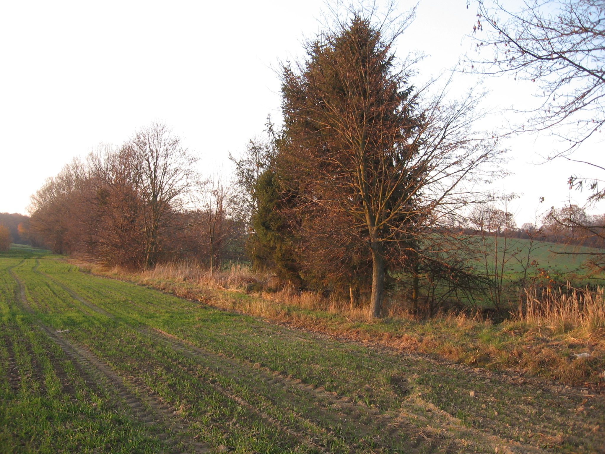 Struktura porostu přítoku do rybníka Štěpán (mimo PR Štěpán)